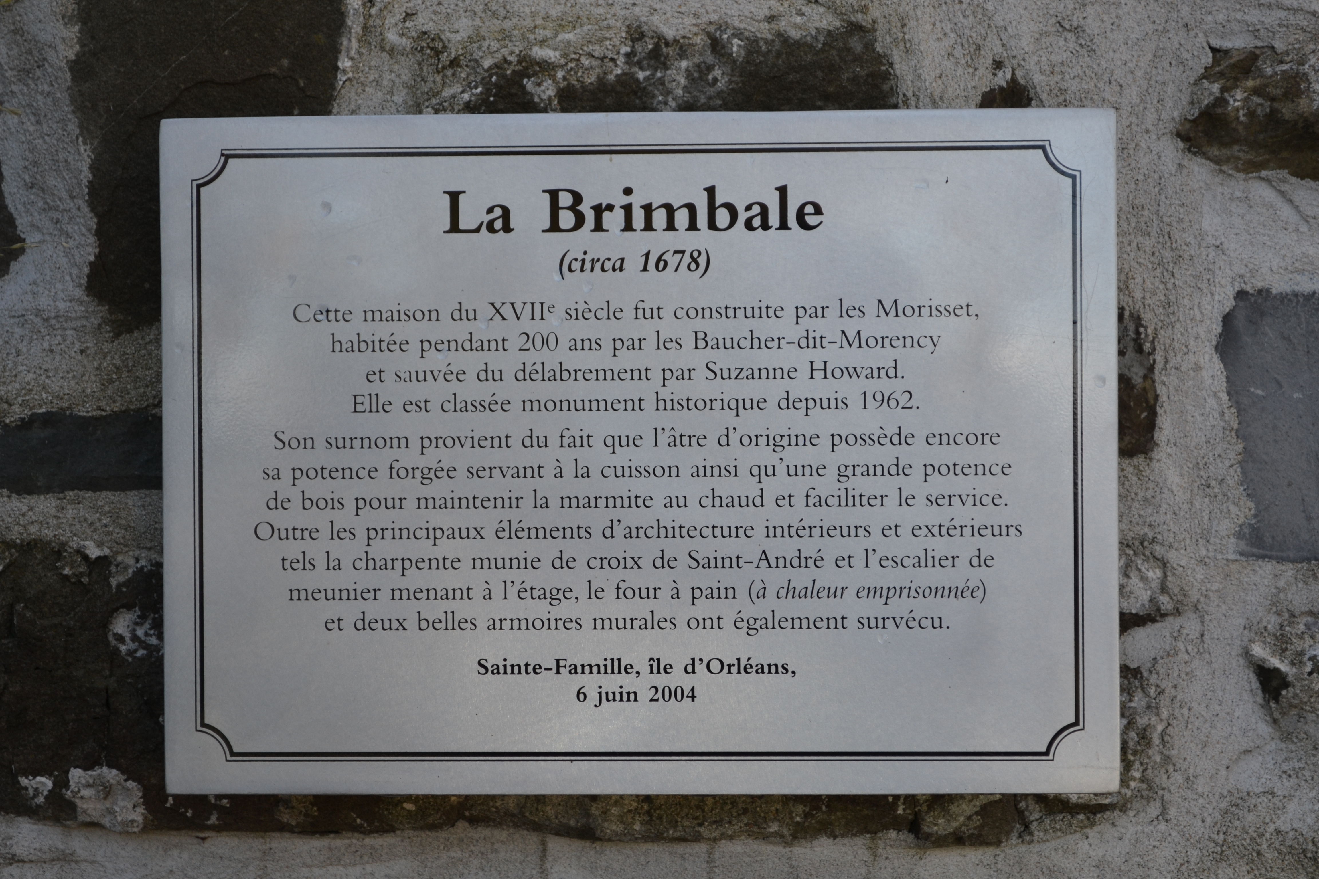 Plaque commémorative sur le mur est de la maison Maison Morisset, 4417, chemin Royal, Sainte-Famille (Canada). (Protection MH classé. Voir la liste des lieux patrimoniaux de la Capitale-Nationale pour plus de détails).